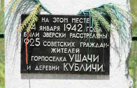 Ушачи. Надпись на памятнике евреям местечек Ушачи и Кубличи, убитых нацистами и их приспешниками в январе 1942 года.